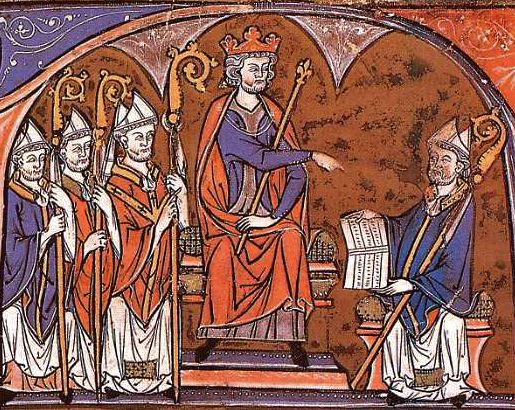 Vidal mayor. Incipit. (Primera compilación del Fuero de Aragón, realizada por el obispo de Huesca Vidal de Canellas en 1247). Jaime I de Aragón recibe del obispo y jurista Vidal de Canellas la compilación de los Fueros de Aragón ante otros magnates eclesiástico. En el plano inferior, otros ricos hombres y magnates de la curia familiar departen animadamente. Texto: «Nos, don Iavmes, por la g[rat]ia de Dius rey d'Aragón et de Malliorgas et de Ualentia, conde de Barcalona et [...]»